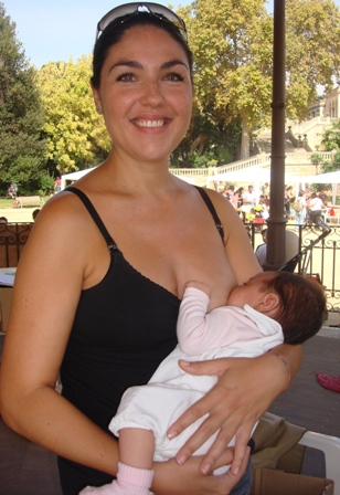 Lactancia materna en el Parc de la Ciutadella de Barcelona